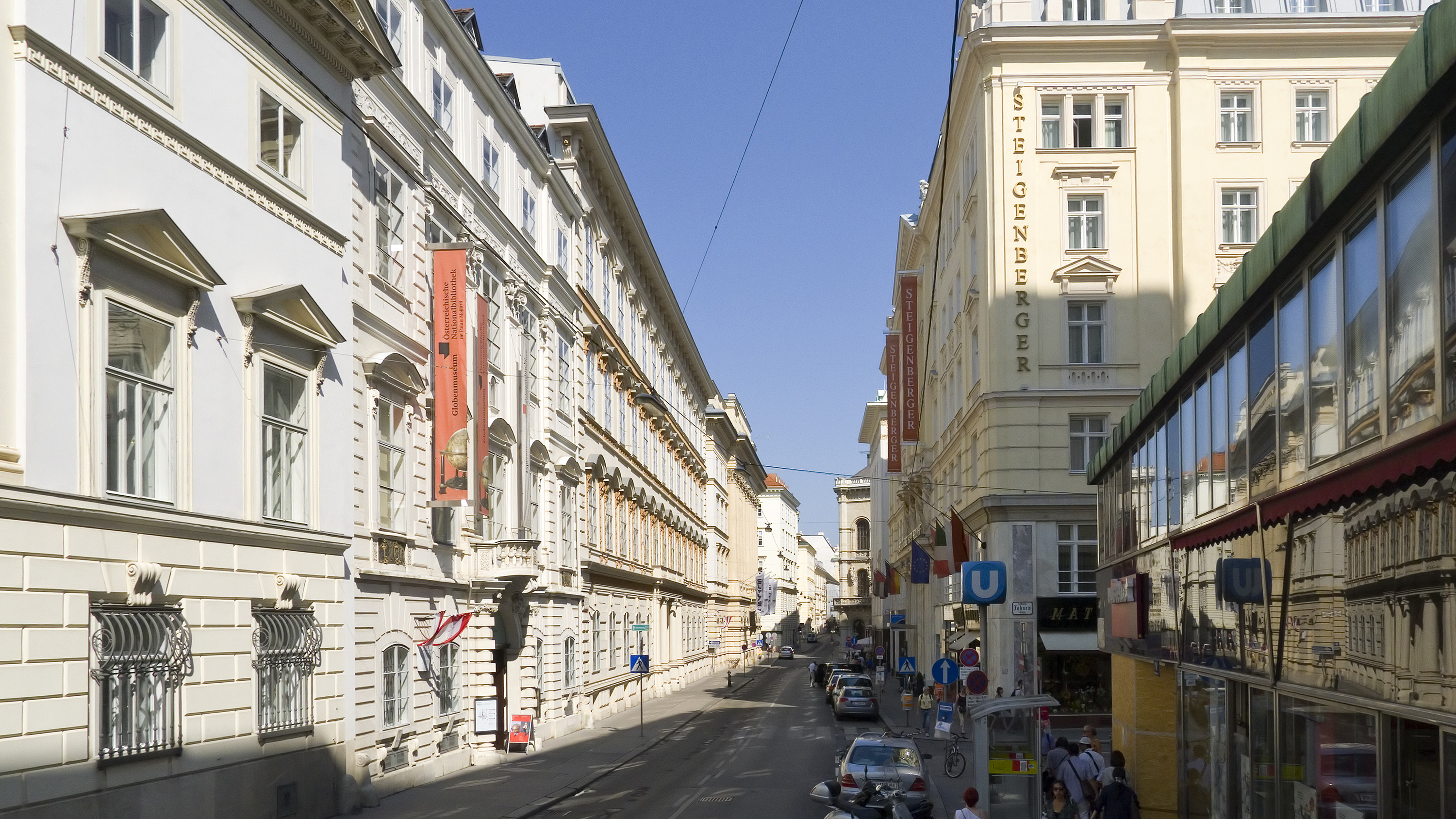 Herrengasse in Wien 1 bei Nr. 7 Richtung Norden